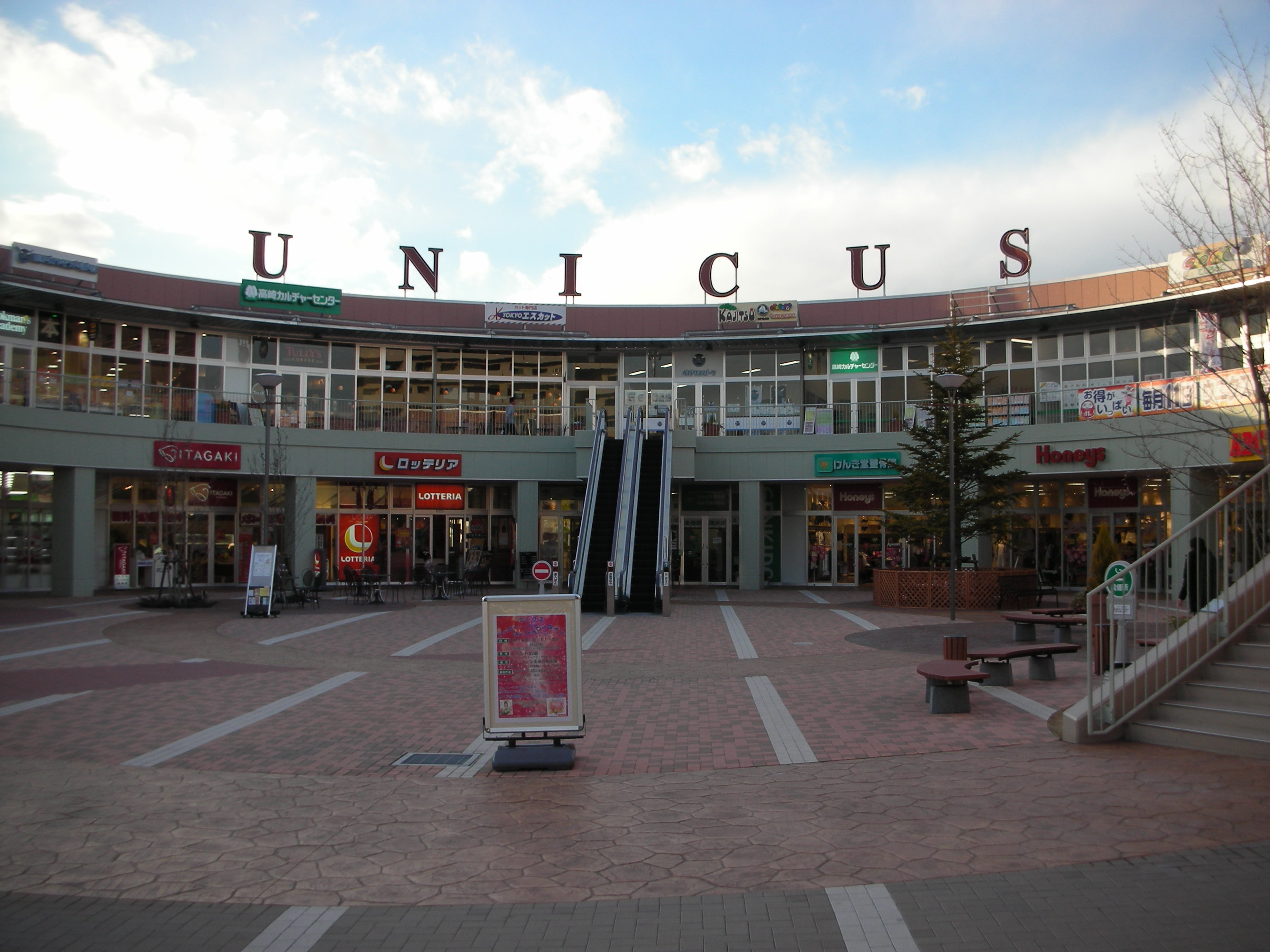 ウニクス高崎の外観